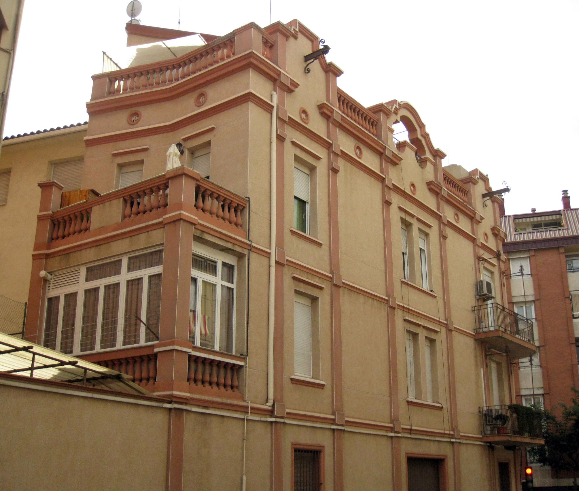 Casa Celedonio Badia Tort, a la carretera de Martorell núm. 54, cantonada amb el carrer de Galileu núm. 2 (Terrassa). Edifici noucentista de Joaquim Raspall (1921). Vista de la façana de Galileu.